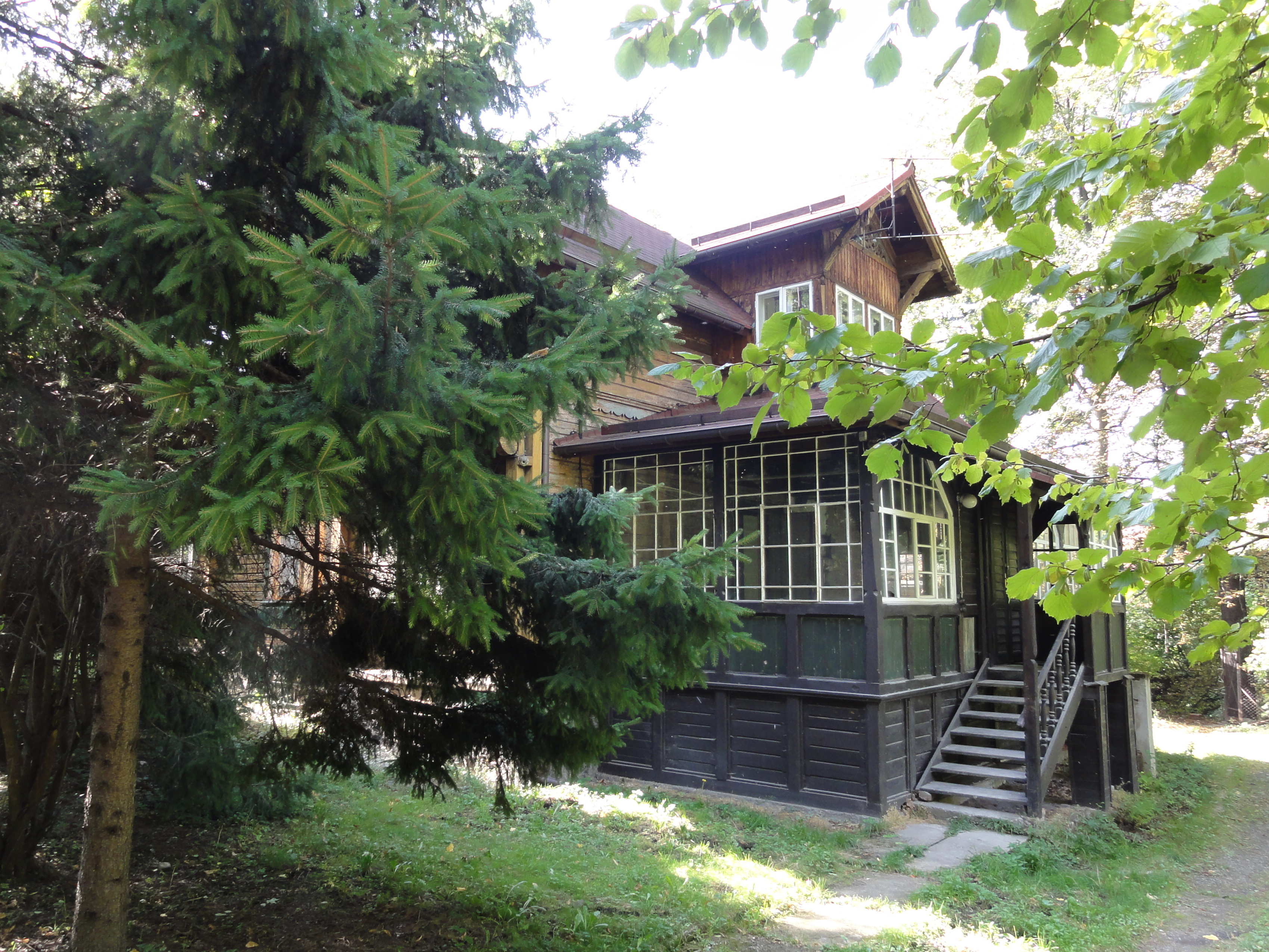 Bielsko-Biała, Olszówki 46